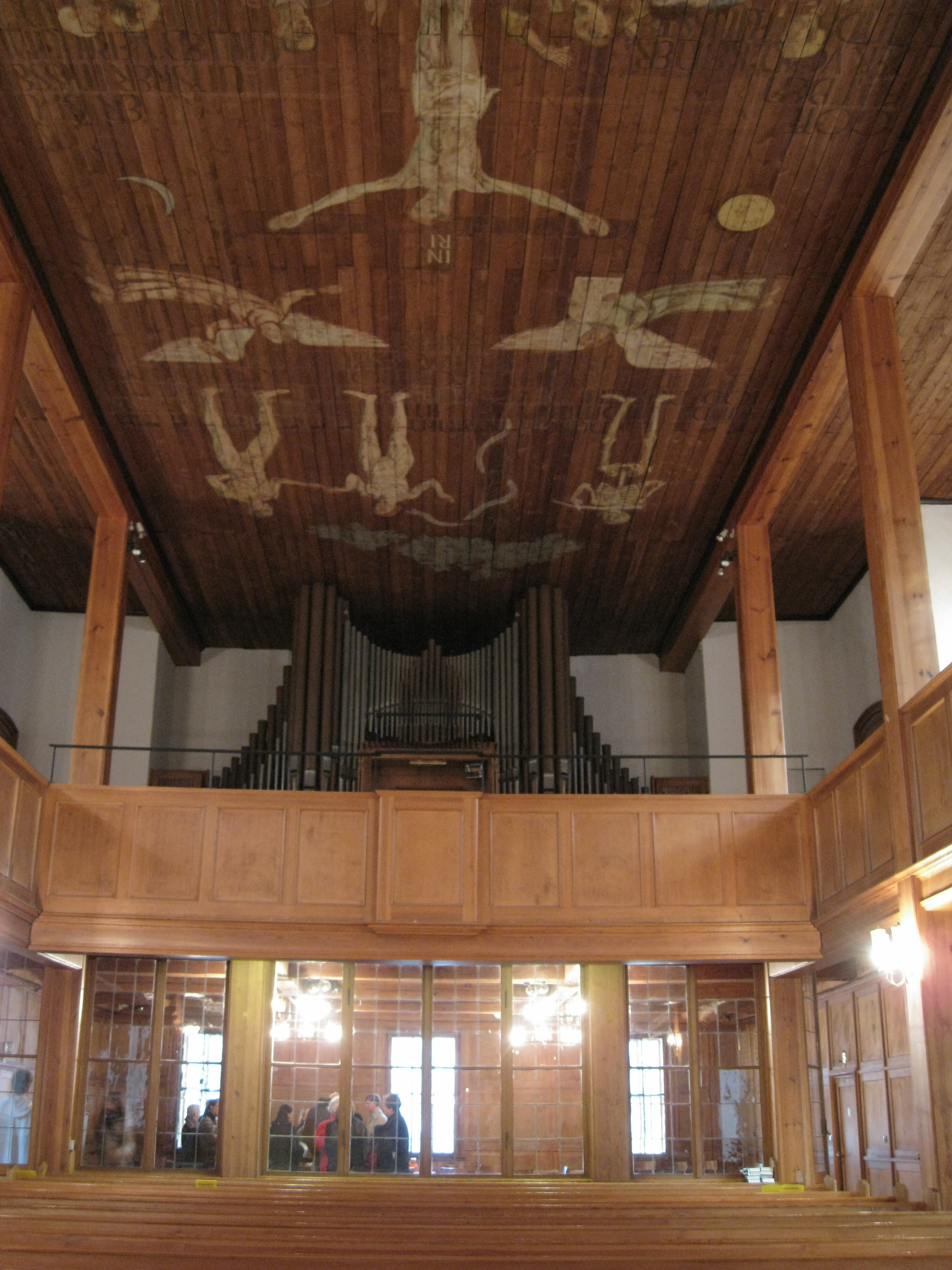 Blick in Richtung Orgel